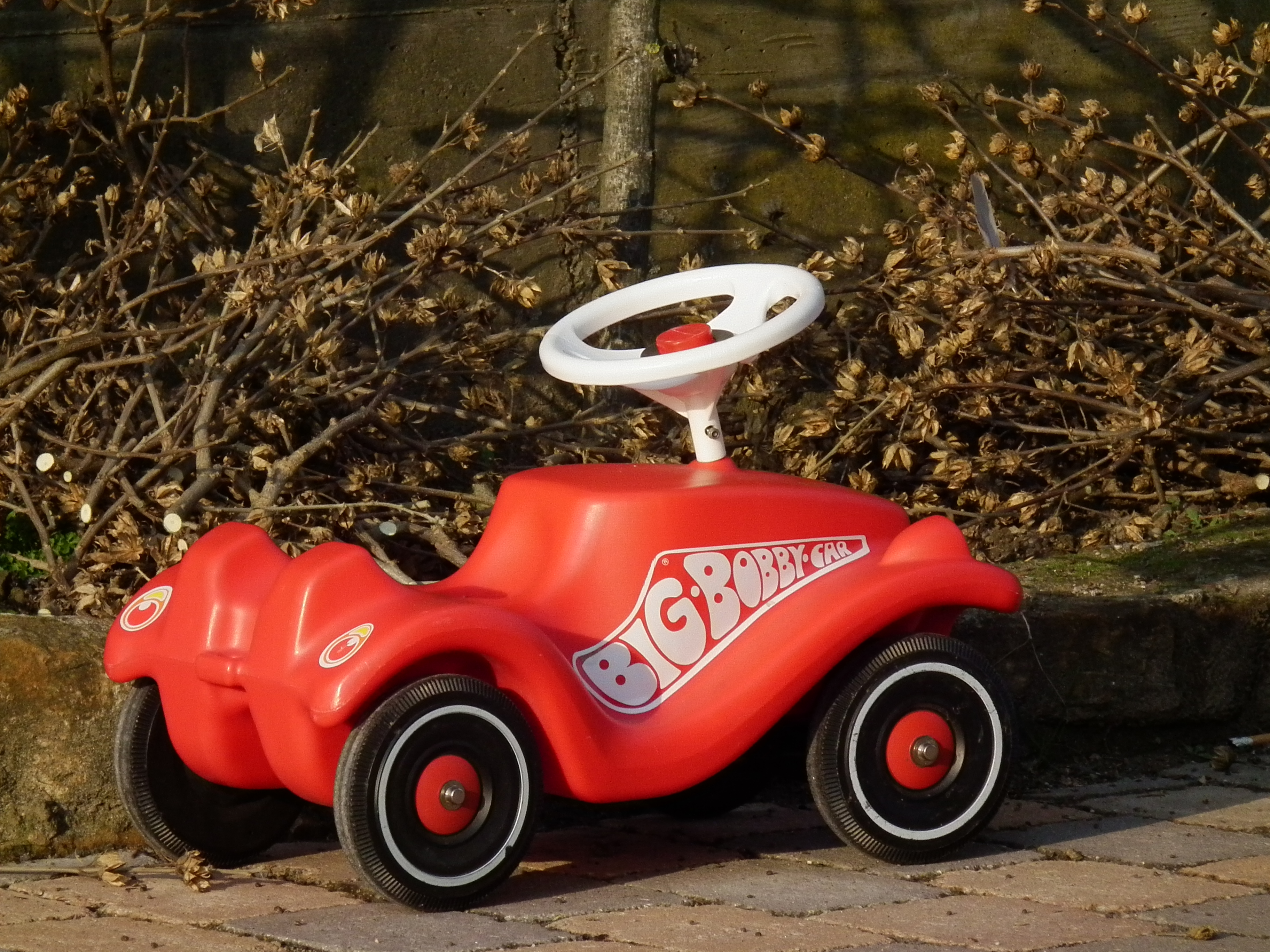 Roter Big Bobby Car